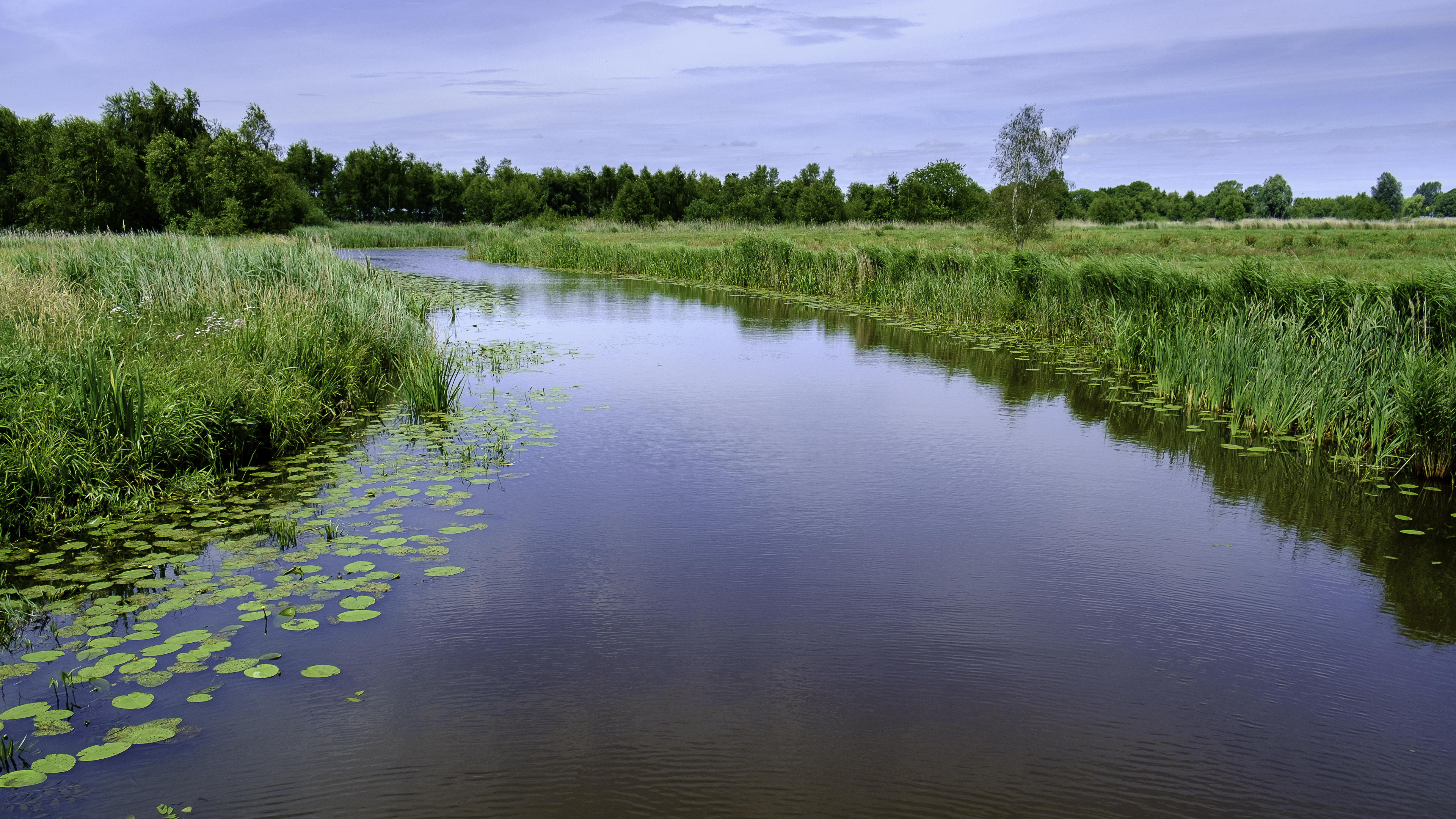 De Slochter Ae bij de kruising met het Afwateringskanaal van Duurswold (ten zuiden van Schaaphok) gezien naar het noorden